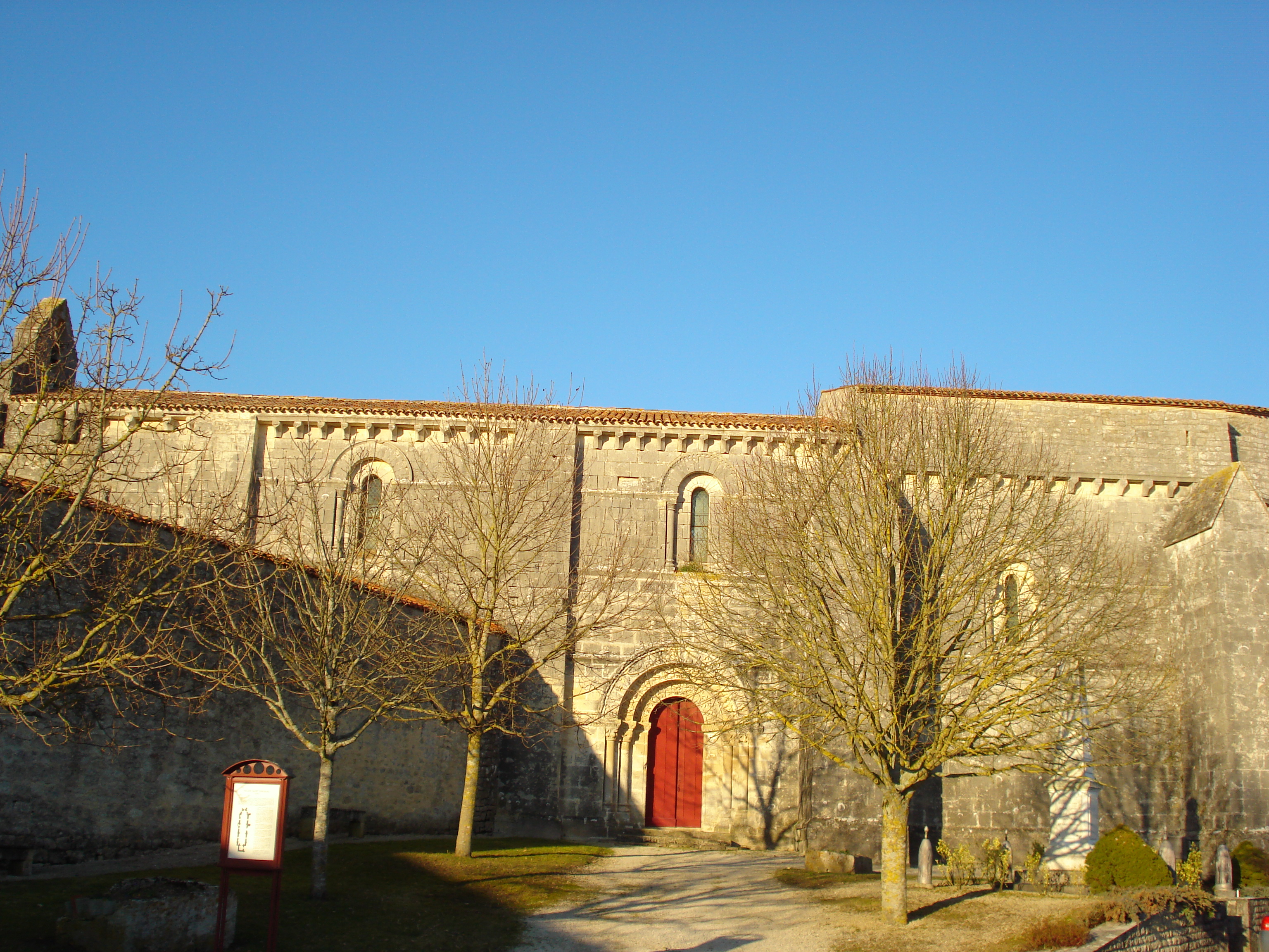 L'église de Contré